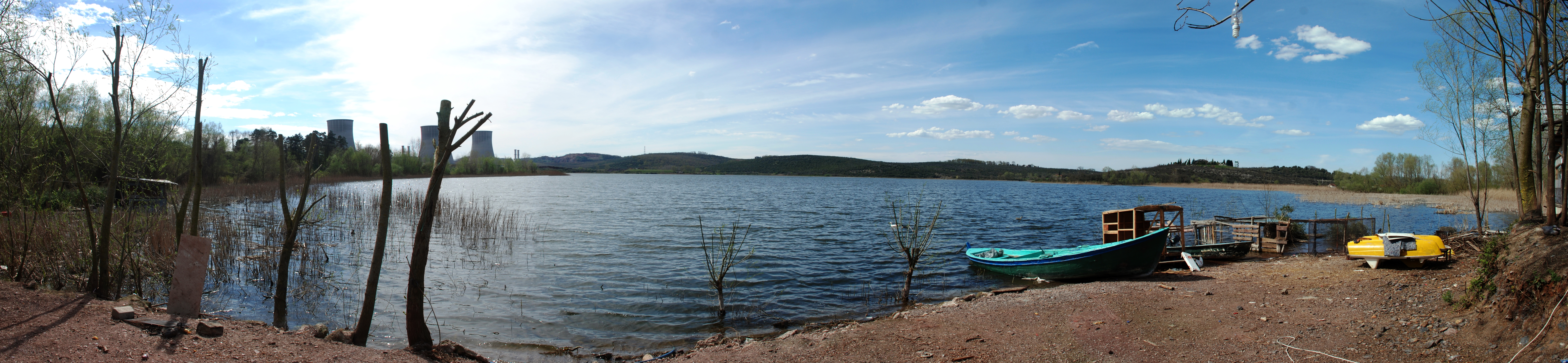 Taşkısığı Gölü, Sakarya